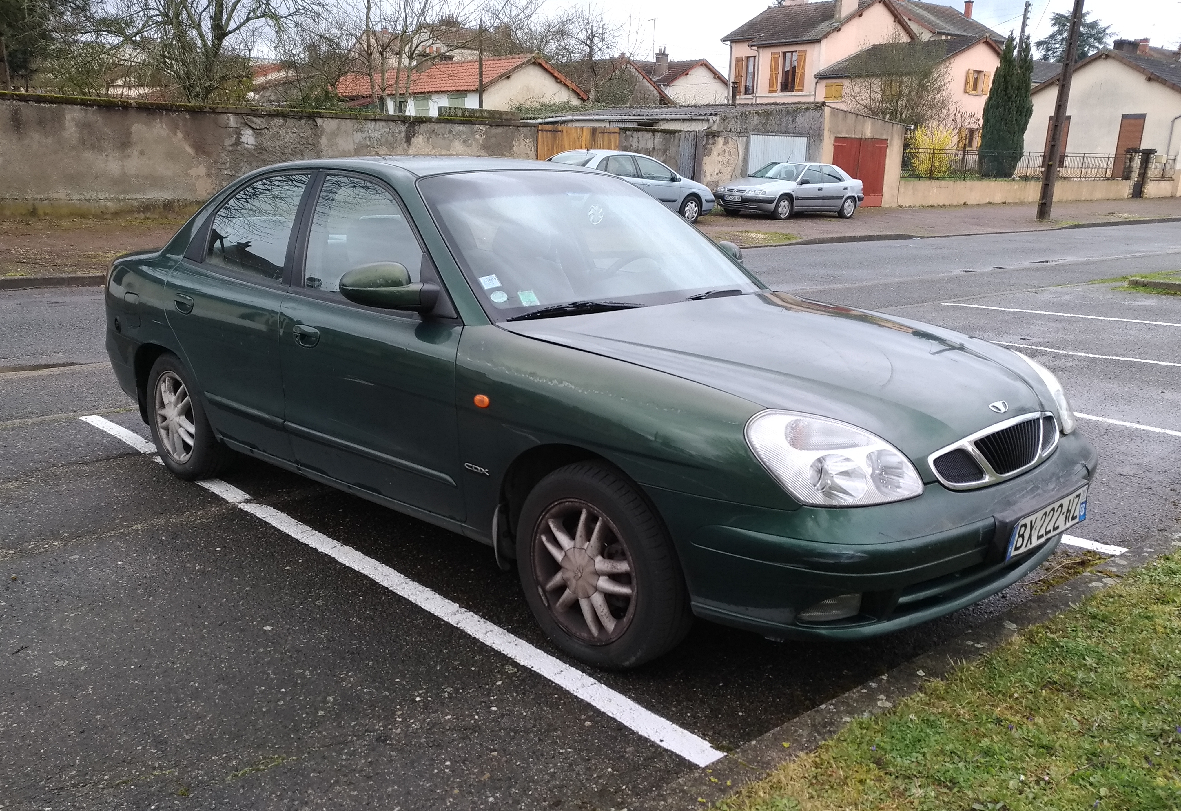 2000 Daewoo Nubira (2.0 133 hp) at Nevers